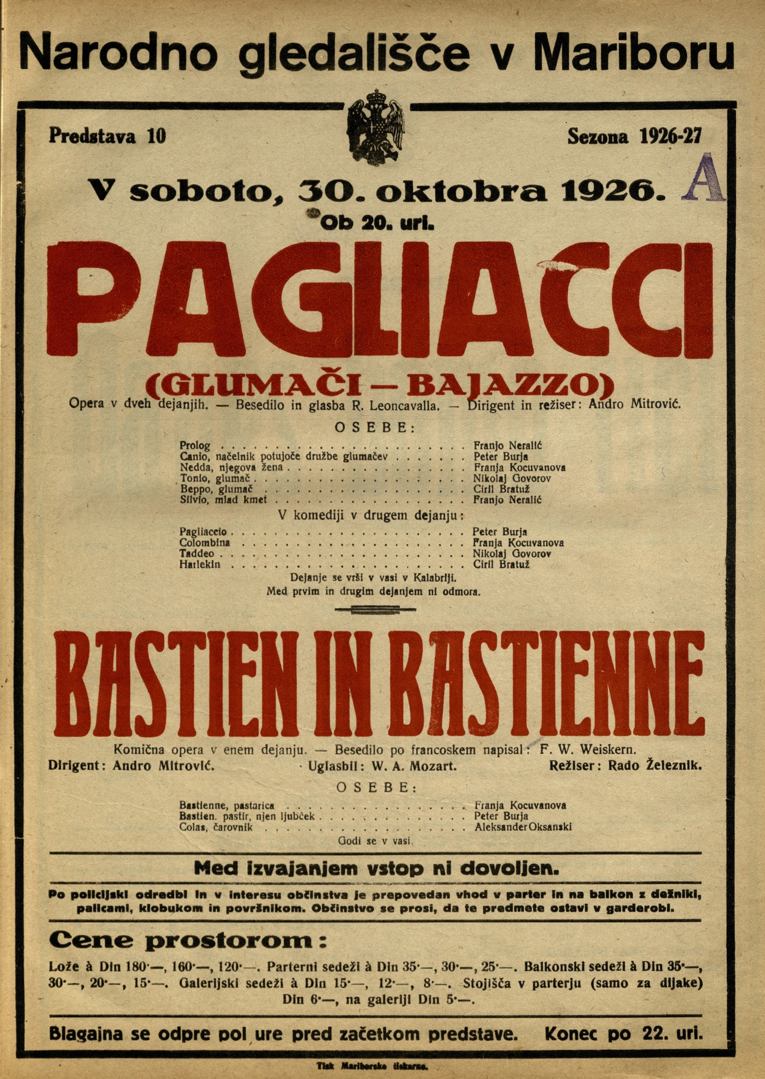 Plakat za predstavi Pagliacci in Bastien in Bastienne v Narodnem gledališču v Mariboru.